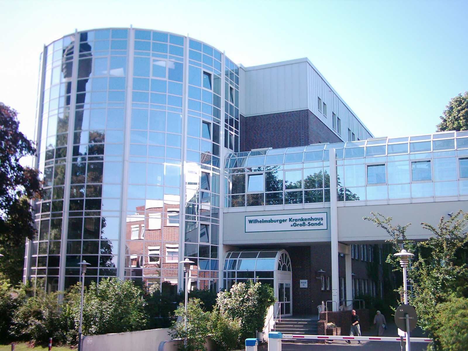 Krankenhaus Groß Sand in Hamburg-Wilhelmsburg.